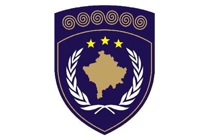 Grb koji je bio u poluslužbenoj uporabi do 17. veljače 2008.